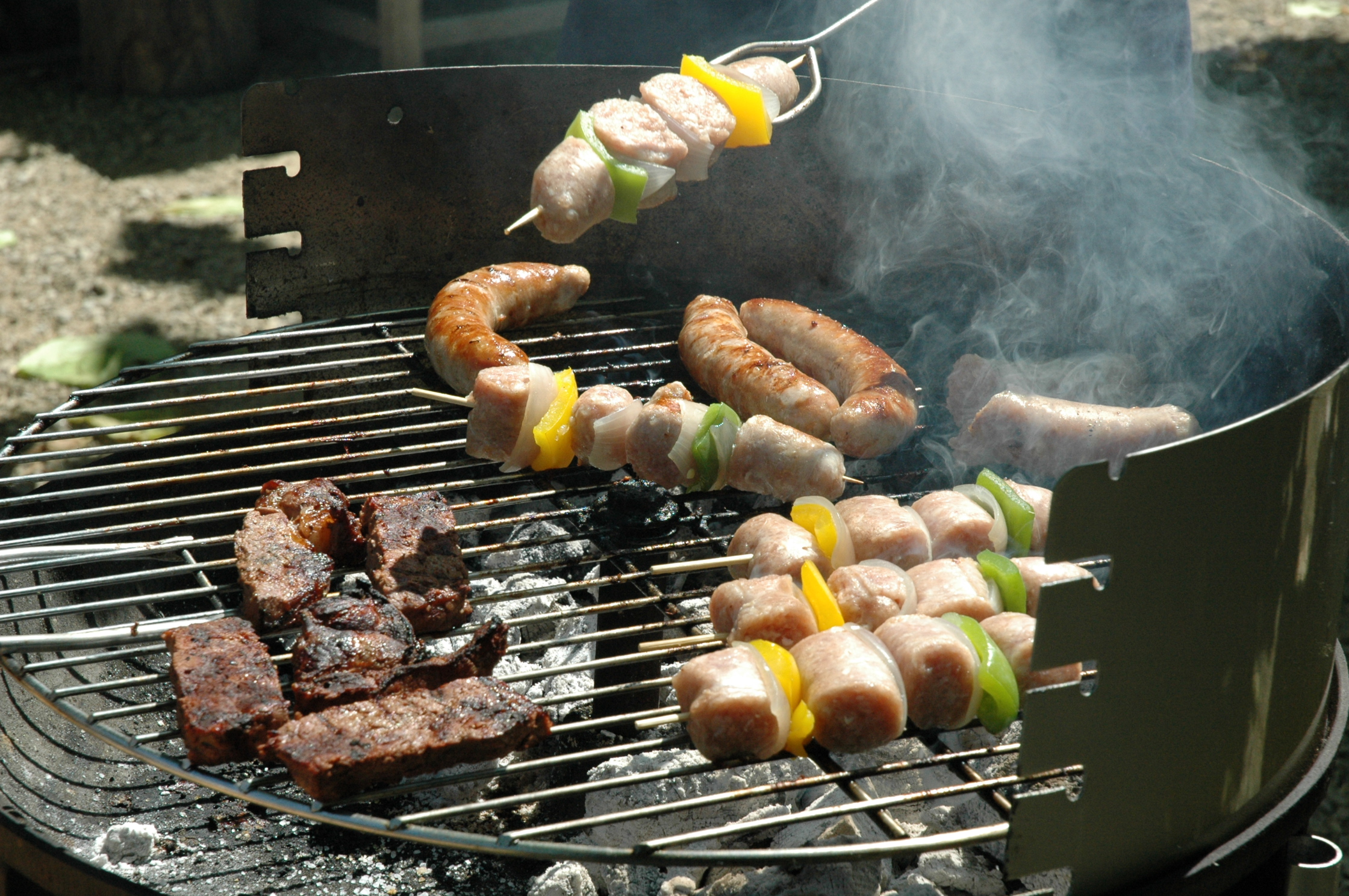 Vlees op een barbecue; (en) Meat on a barbecue